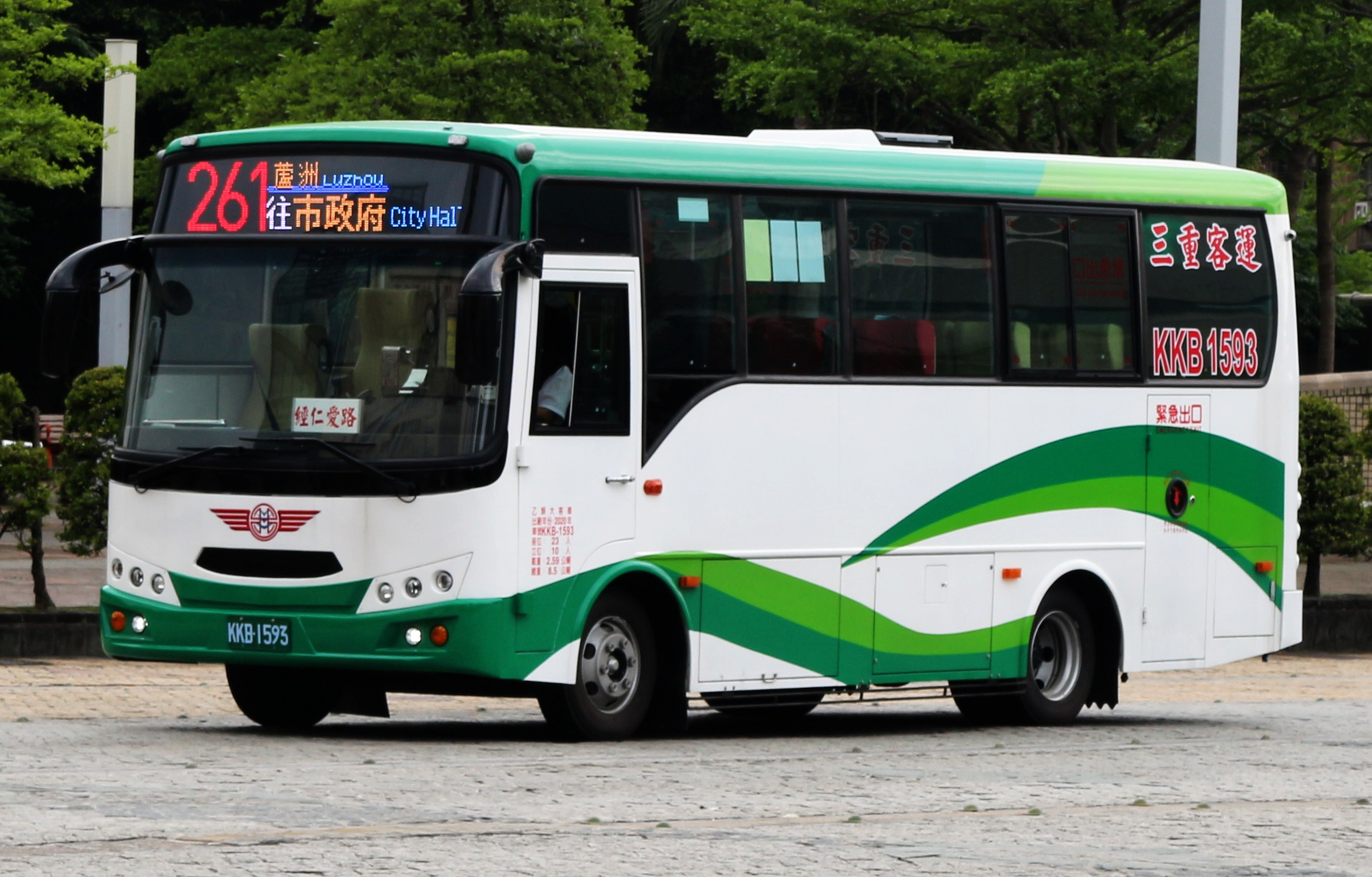 三重客運2020 ISUZU NQR90LKB5 KKB-1593 261